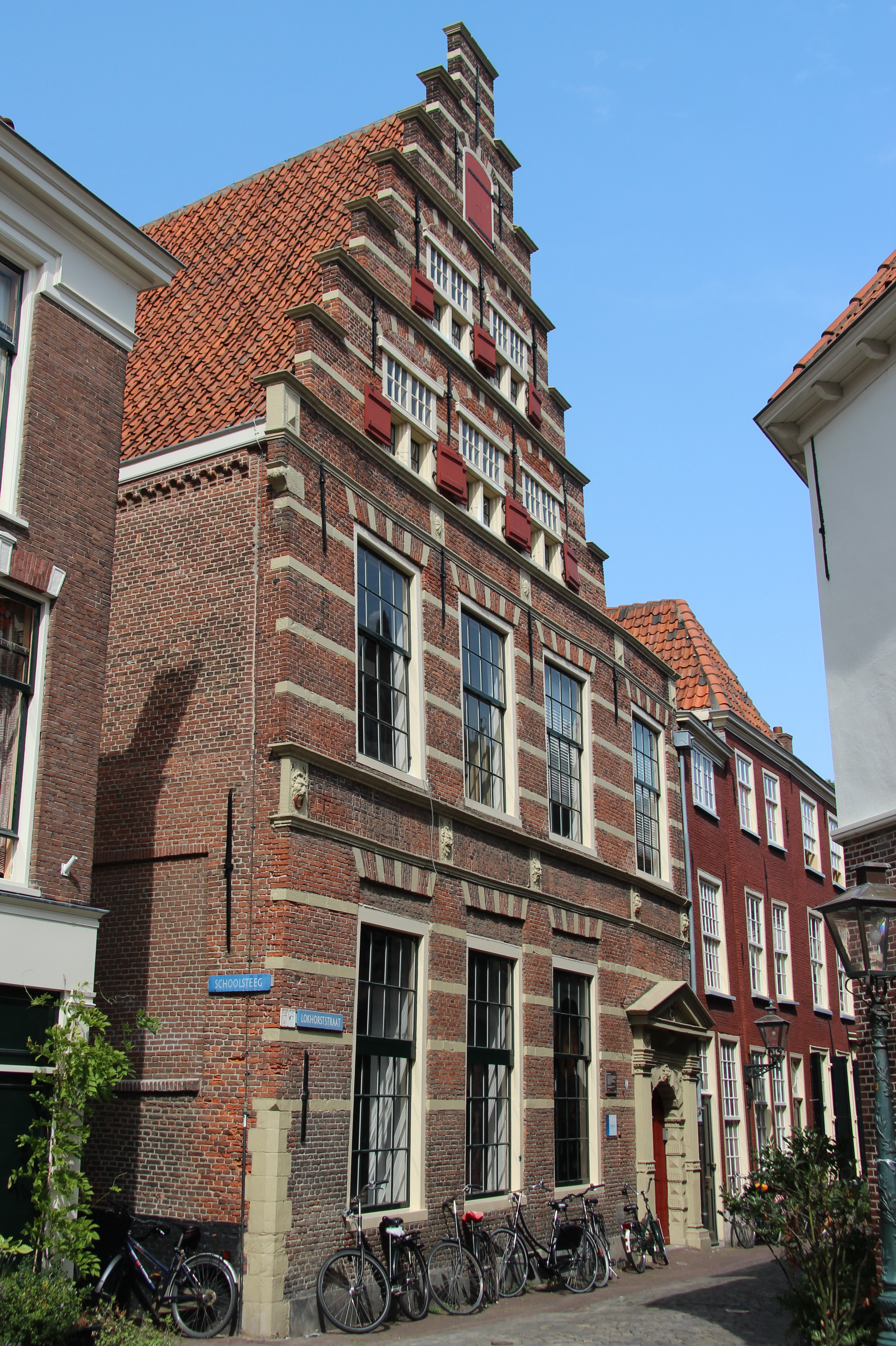 Latijnse school Lokhorststraat 16 Leiden. De Latijnse school is een rijksmonument in de binnenstad van Leiden. Onder andere Rembrandt van Rijn heeft hier les gekregen. Het gebouw aan de Lokhorststraat in de Pieterswijk dateert uit 1599 en is ontworpen door stadsmetselaar Jacob Dircxz. den Dubbelden en stadssteenhouwer Claes Cornelisz. van Es in moderne renaissancestijl.